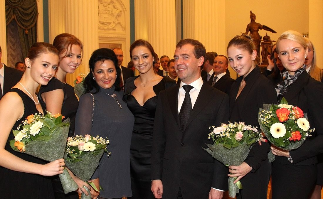 Встреча со спортсменами – победителями чемпионатов мира и Европы 2010 года.